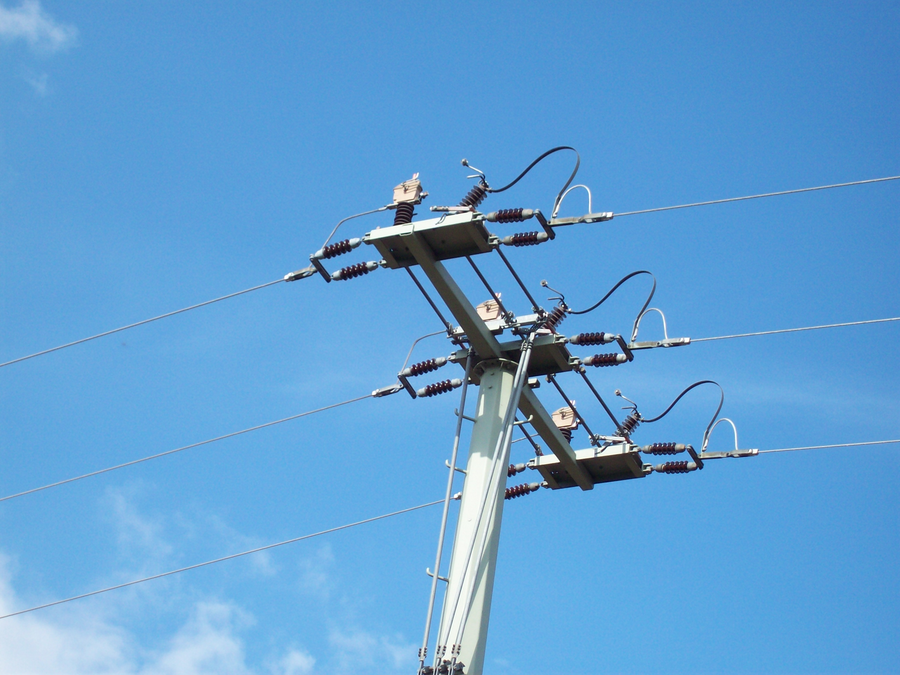 Ein Masttrenner für Mittelspannung in der Offen-Stellung. Die beiden Teile der Leitungen sind also nicht elektrisch verbunden.